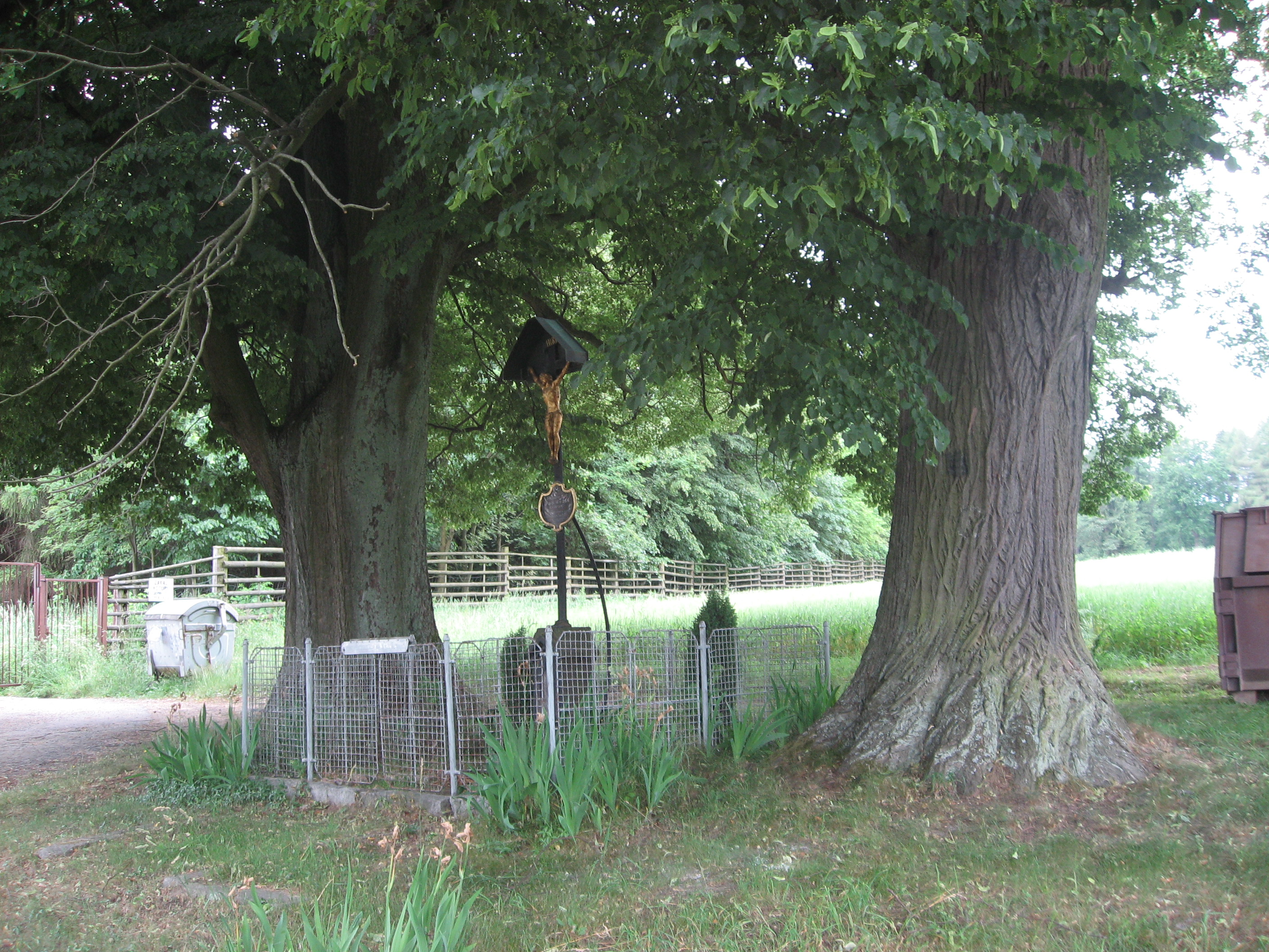 Mozerov